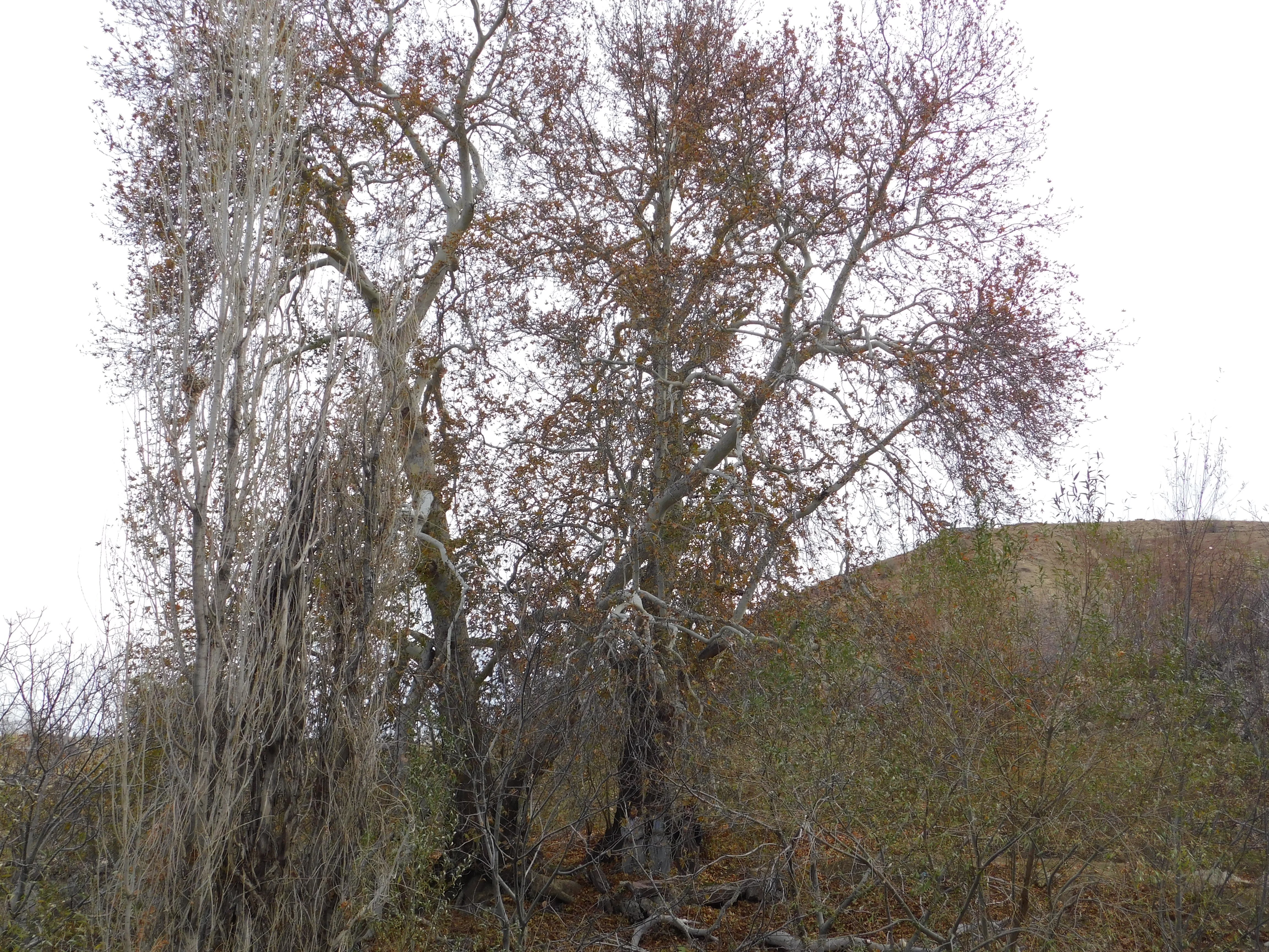 درخت کهنسال 300 ساله و ستبر که در کنار قرستان تخت زنگی است . (تاریخ تهیه عکس 14/06/139 تهیه کننده هادی محمودی).